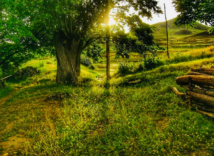 Culfa